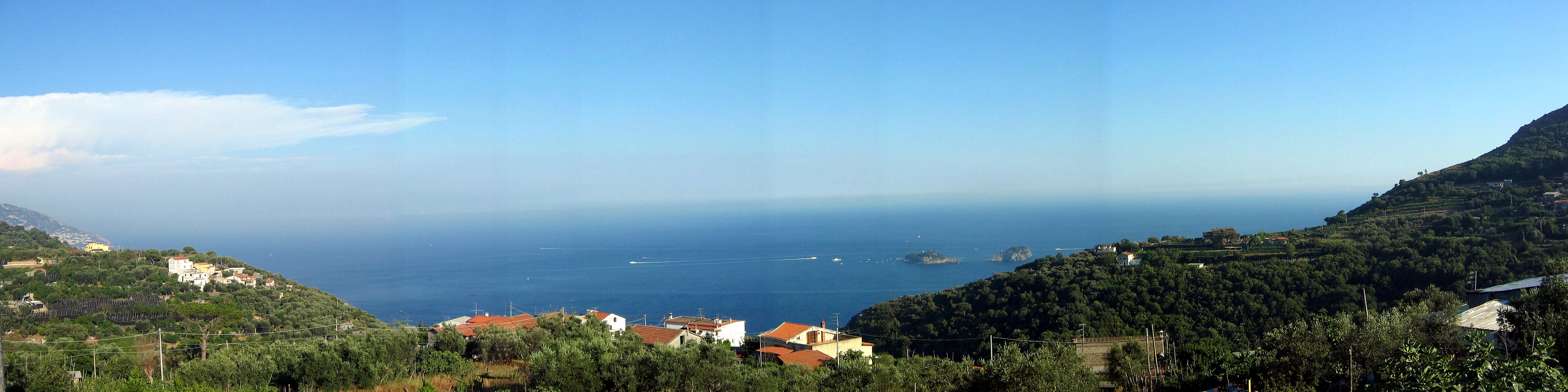 I Colli di Fontanelle sono una frazione di Sant'Agnello, in provincia di Napoli, ubicata sulle colline della Penisola Sorrentina, a poco più di 2 km in linea d'aria dal centro cittadino. La foto ritrae il panorama che è possibile ammirare dai Colli di Fontanelle guardando verso sud, sul Golfo di Salerno. In mare, a centro-destra, sono visibili le isole Li Galli.